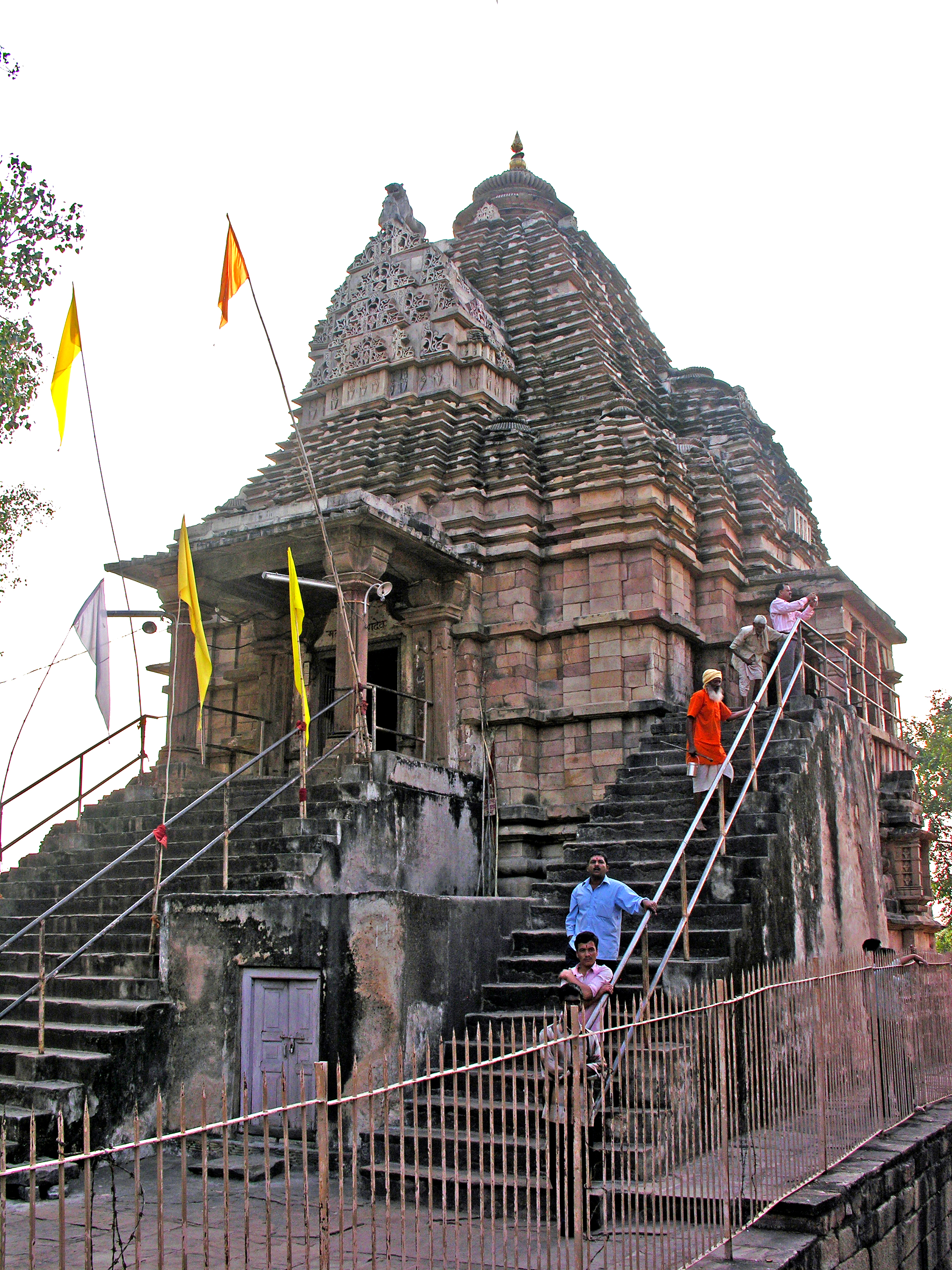 India-5633